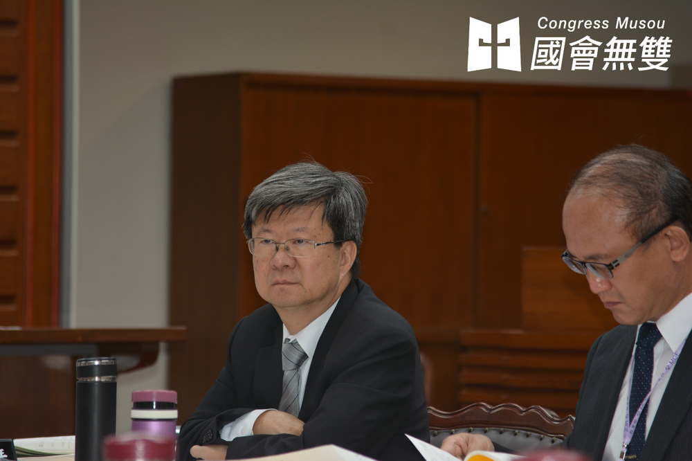 立法院教育文化委員會今（15）日處理教育部105年度預算，民進黨立委鄭麗君認為，教育部部長吳思華處理723反課綱學生陳抗事件失當，竟開了教育部長對對學生和記者提告的惡例，提案在117.8萬的部長特別費中刪除72.3萬，要吳思華「銘記723」。但由於國民黨立委反對，提案最後被保留，仍待協商。